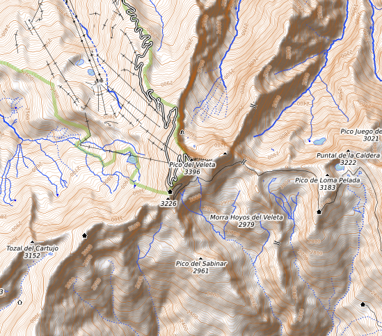 carte réalisée sur umap This map may be incomplete, and may contain errors. Don't rely solely on it for navigation.